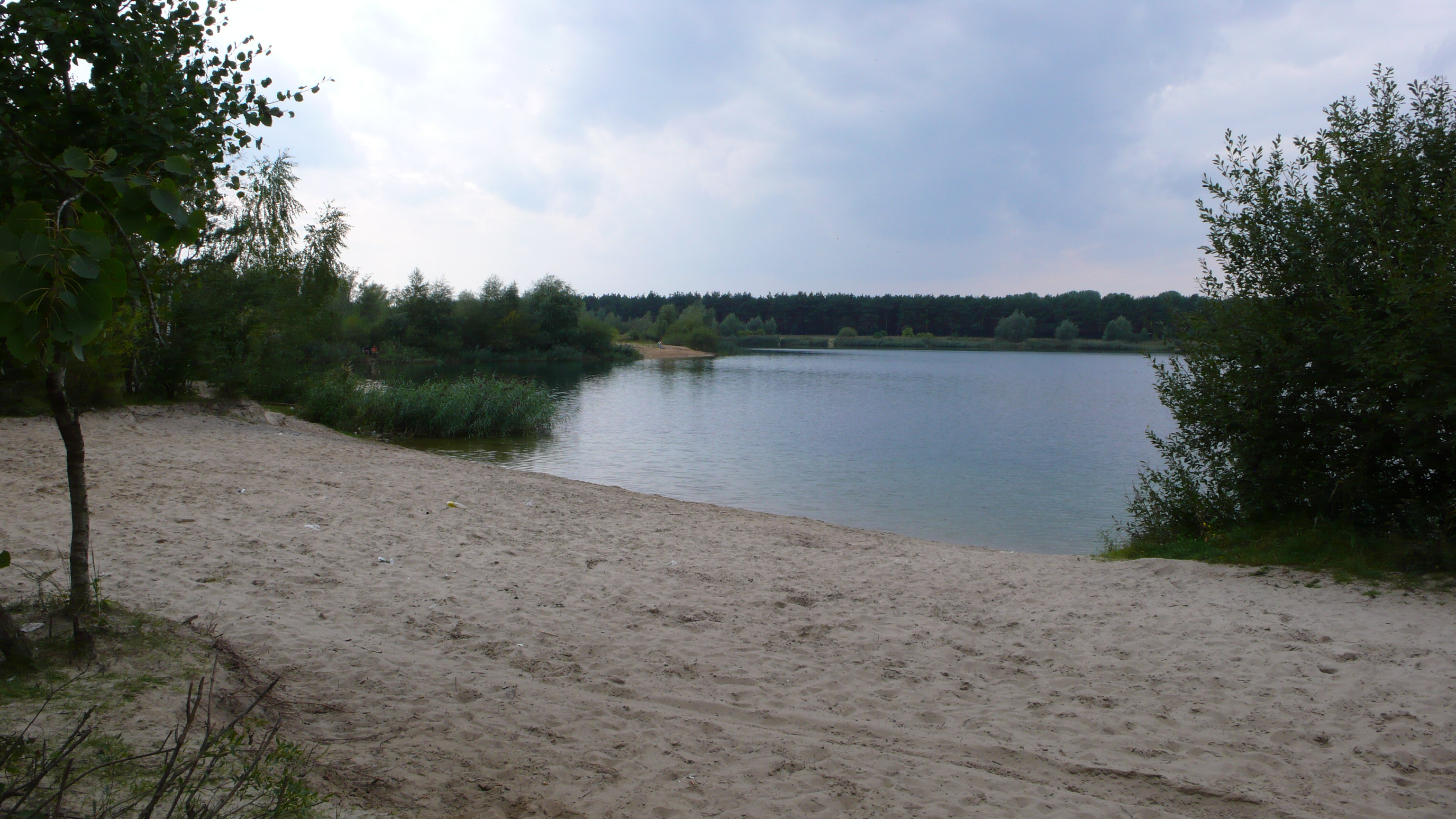 Zbiornik w Zaborowie widok od południa.